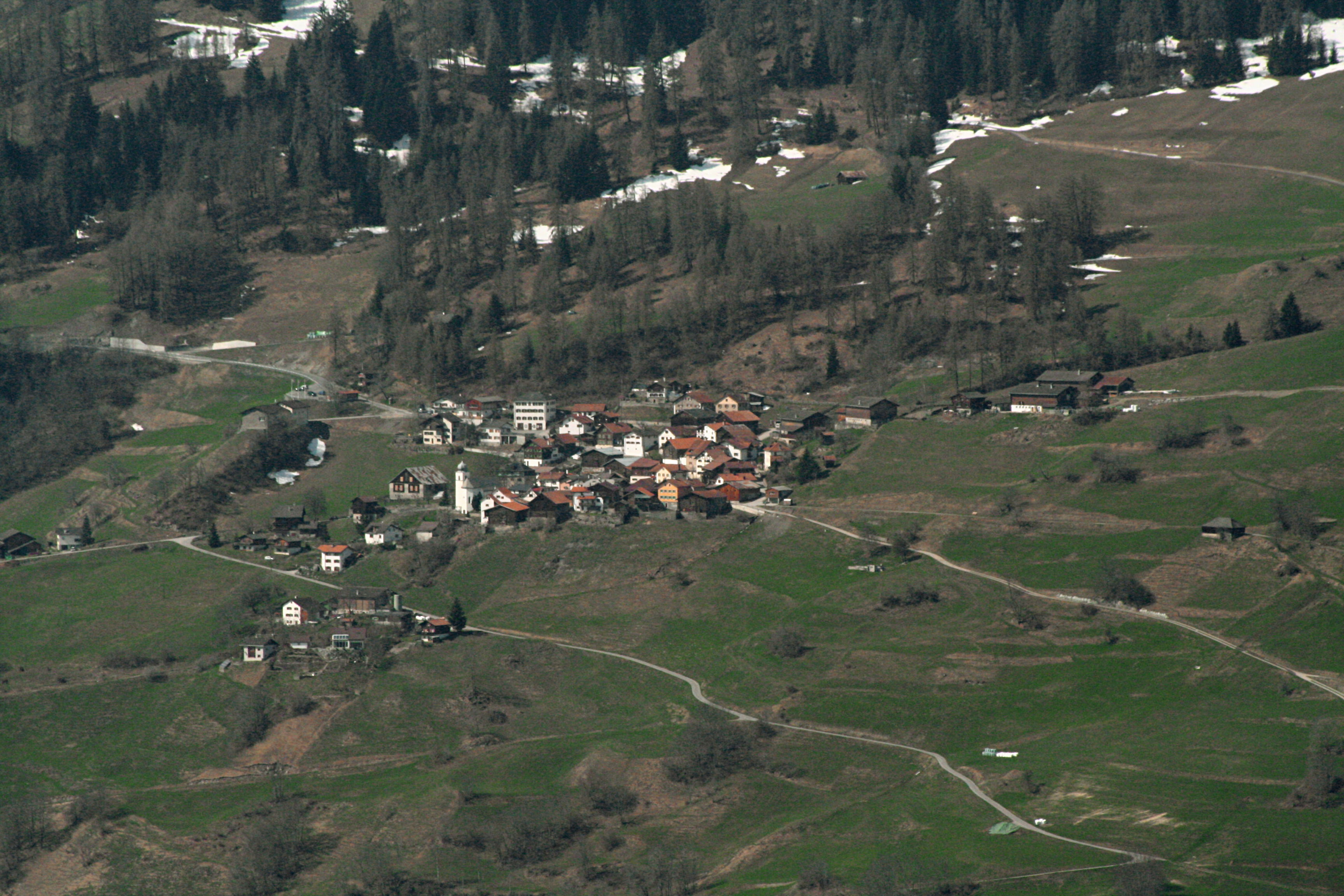 Präz